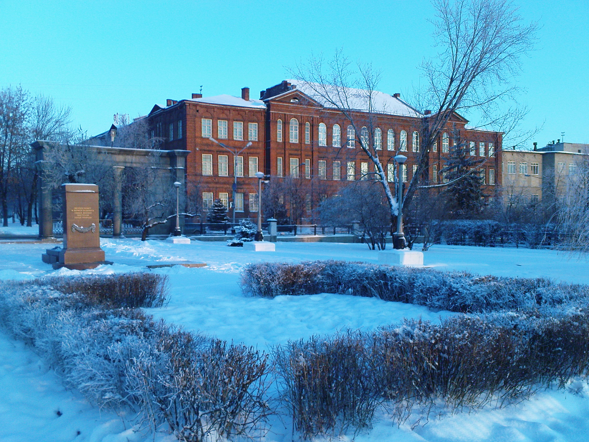 МичГАУ и могила Мичурина зимой, собственная работа